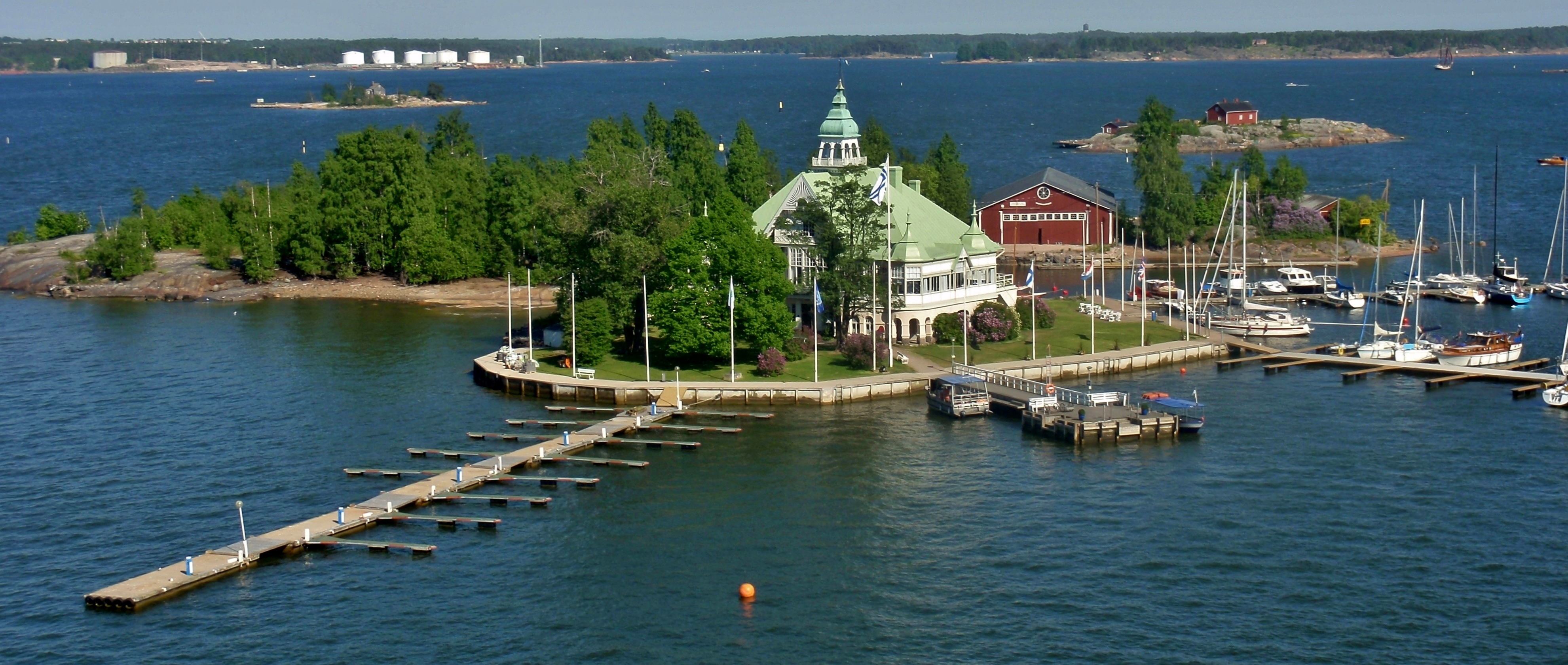 Nyländska Jaktklubbenin paviljonki Valkosaaressa